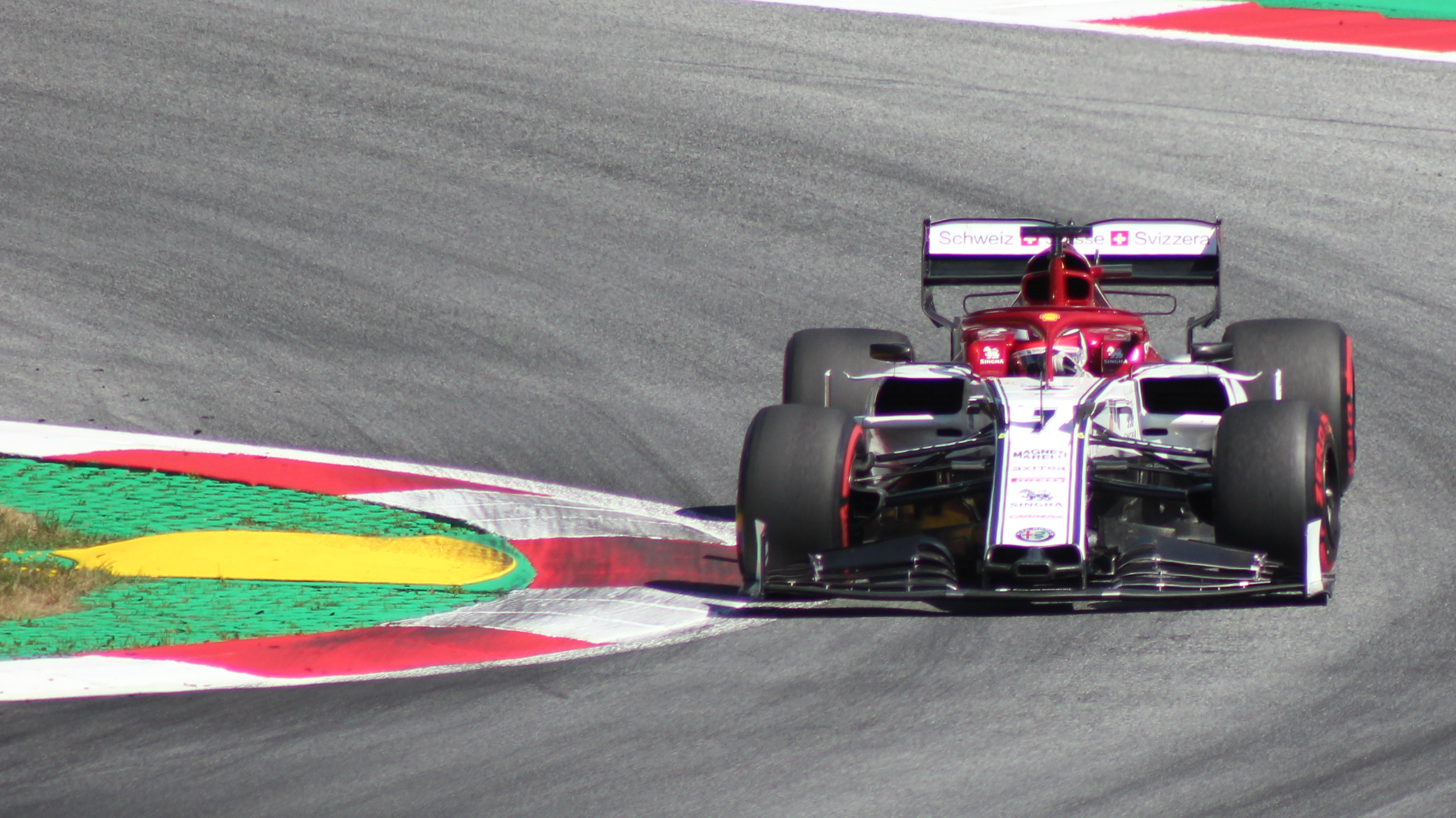 Räikkönen beim Rennwochenende in Österreich 2019